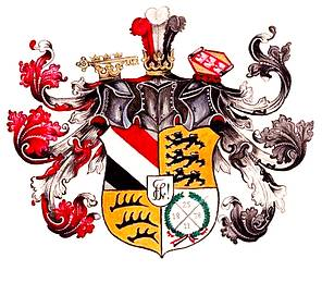 Wappen des Corps Suevia-Strassburg zu Marburg